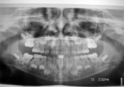 Dentadura de una niña de 5 años y 7 meses. Dentición mixta.